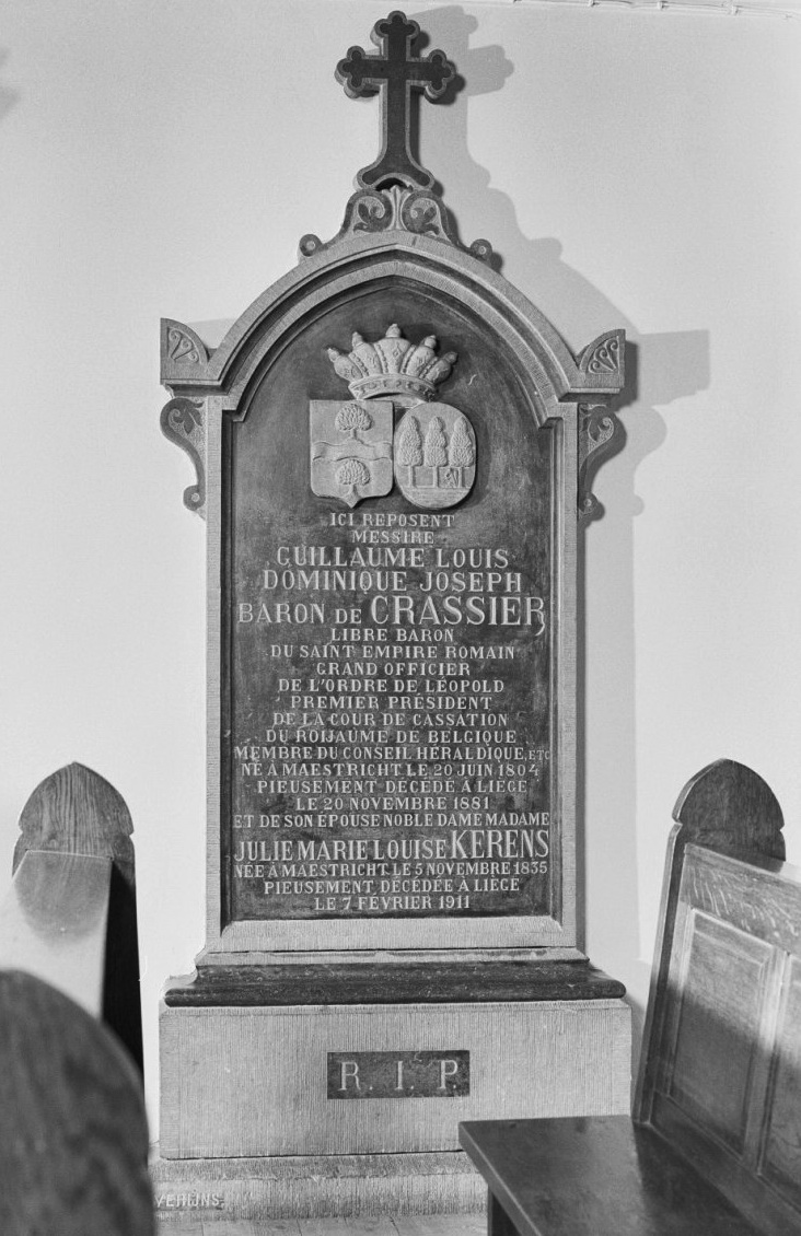 Sint Jan De Doper: Interieur, zerk in zuidmuur